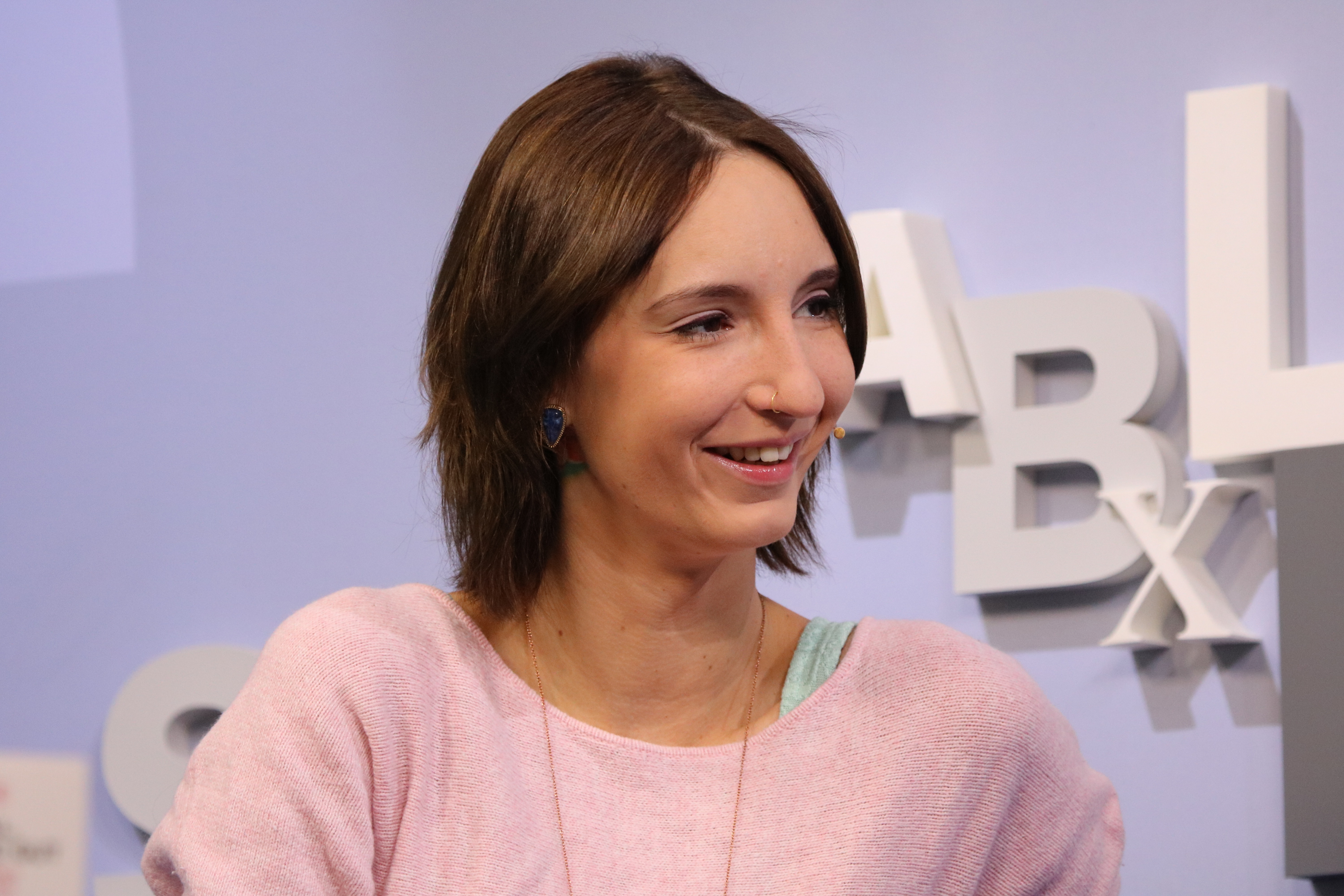 auf der Frankfurter Buchmesse am 17. Oktober 2015